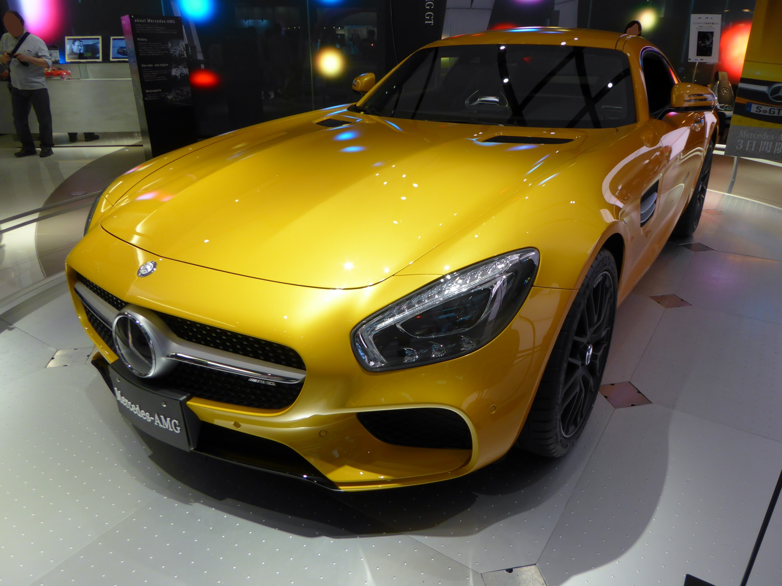 C190型メルセデス・AMG GT Sをフロントから撮影。